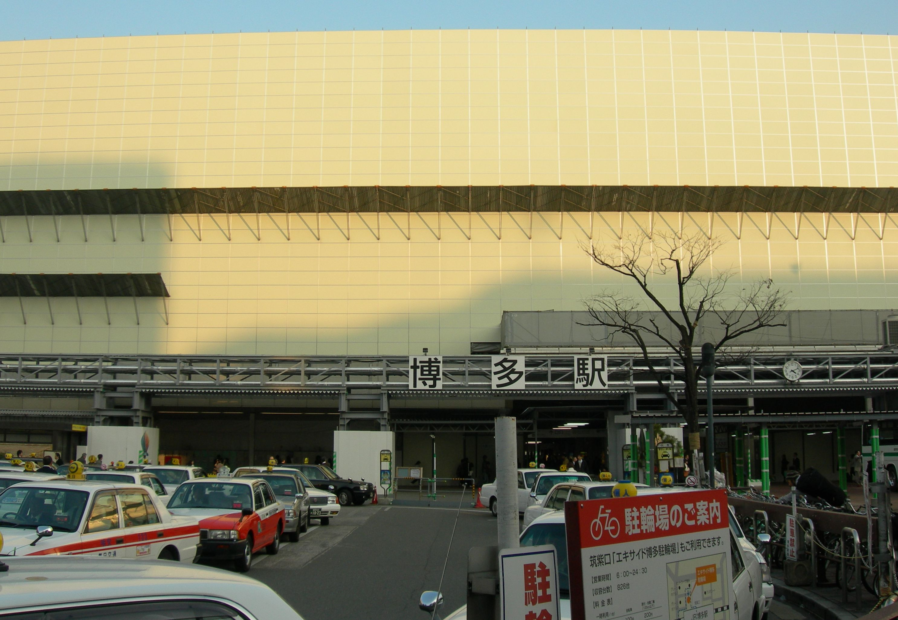 駅舎建替工事中の博多駅（福岡市）。